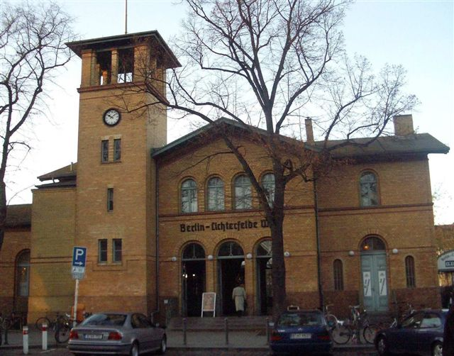 Lichterfelde West Train Station Bahnhof